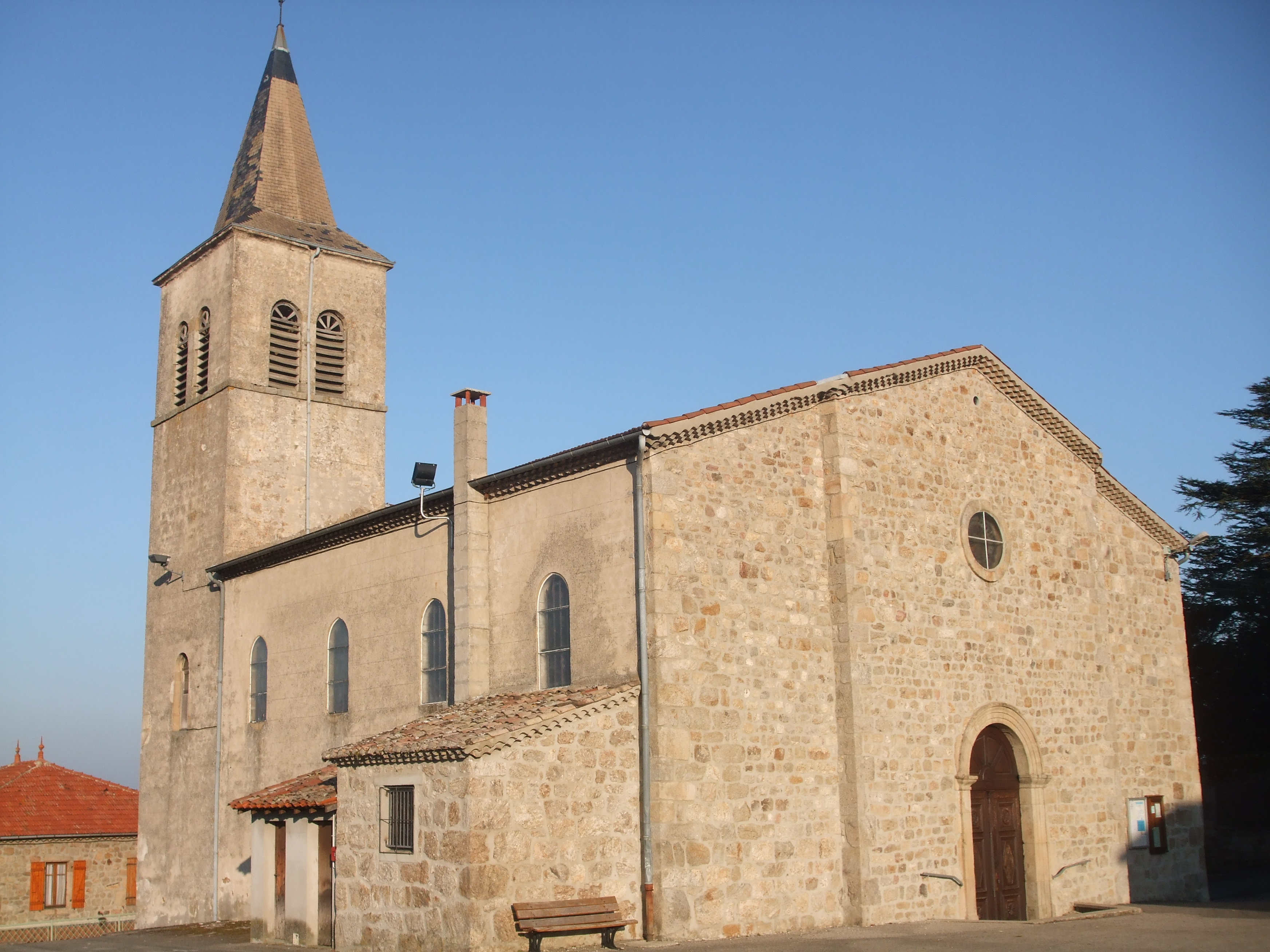 église St Pierre